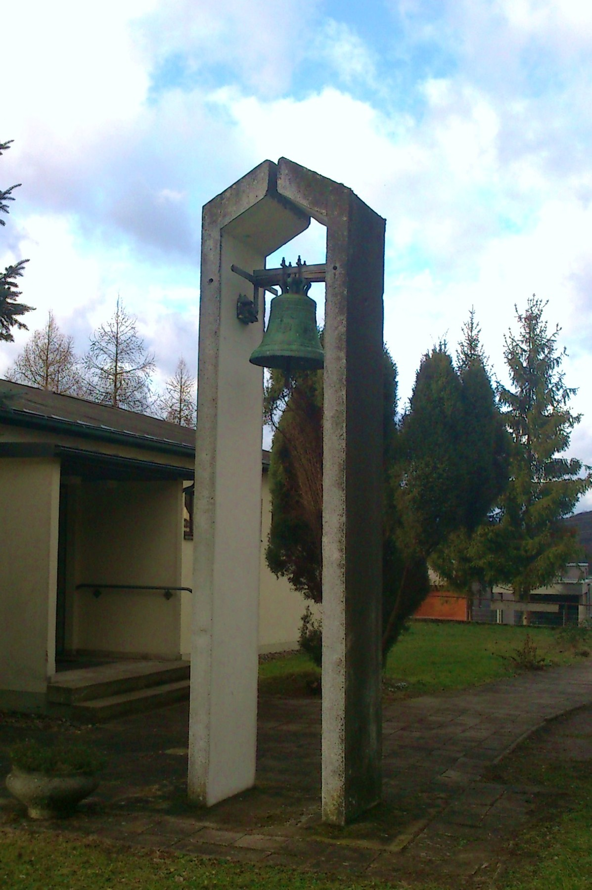 Seperater Glockenträger mit Glocke der Kirche "Zum Heiligen Kreuz", auch Kreuzkirche genannt, in Meiningen.